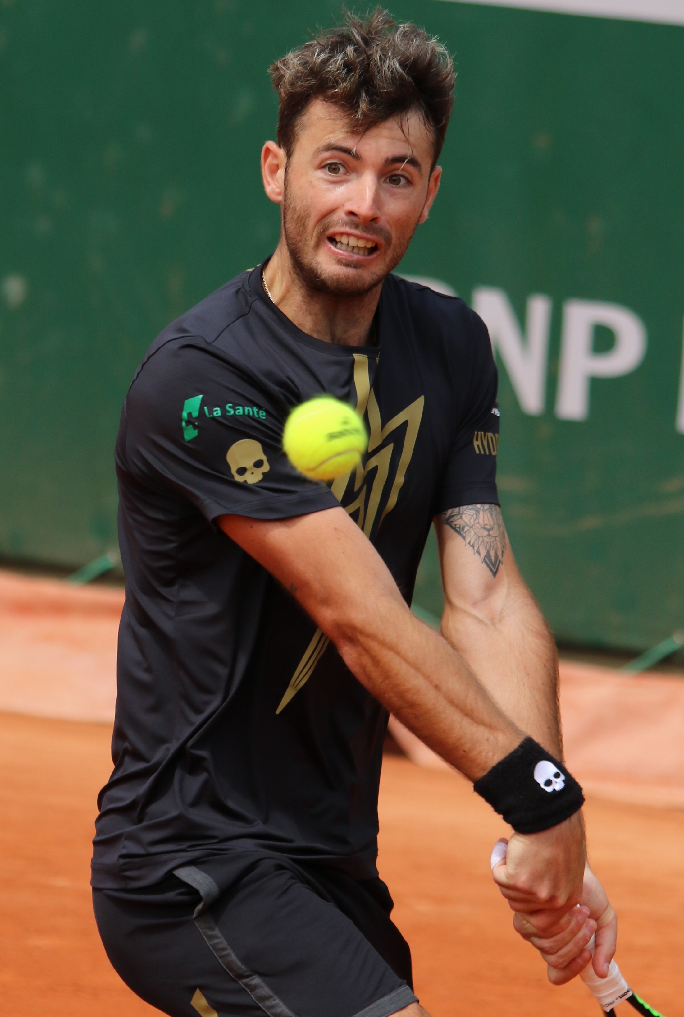 Londero RG19 (28)